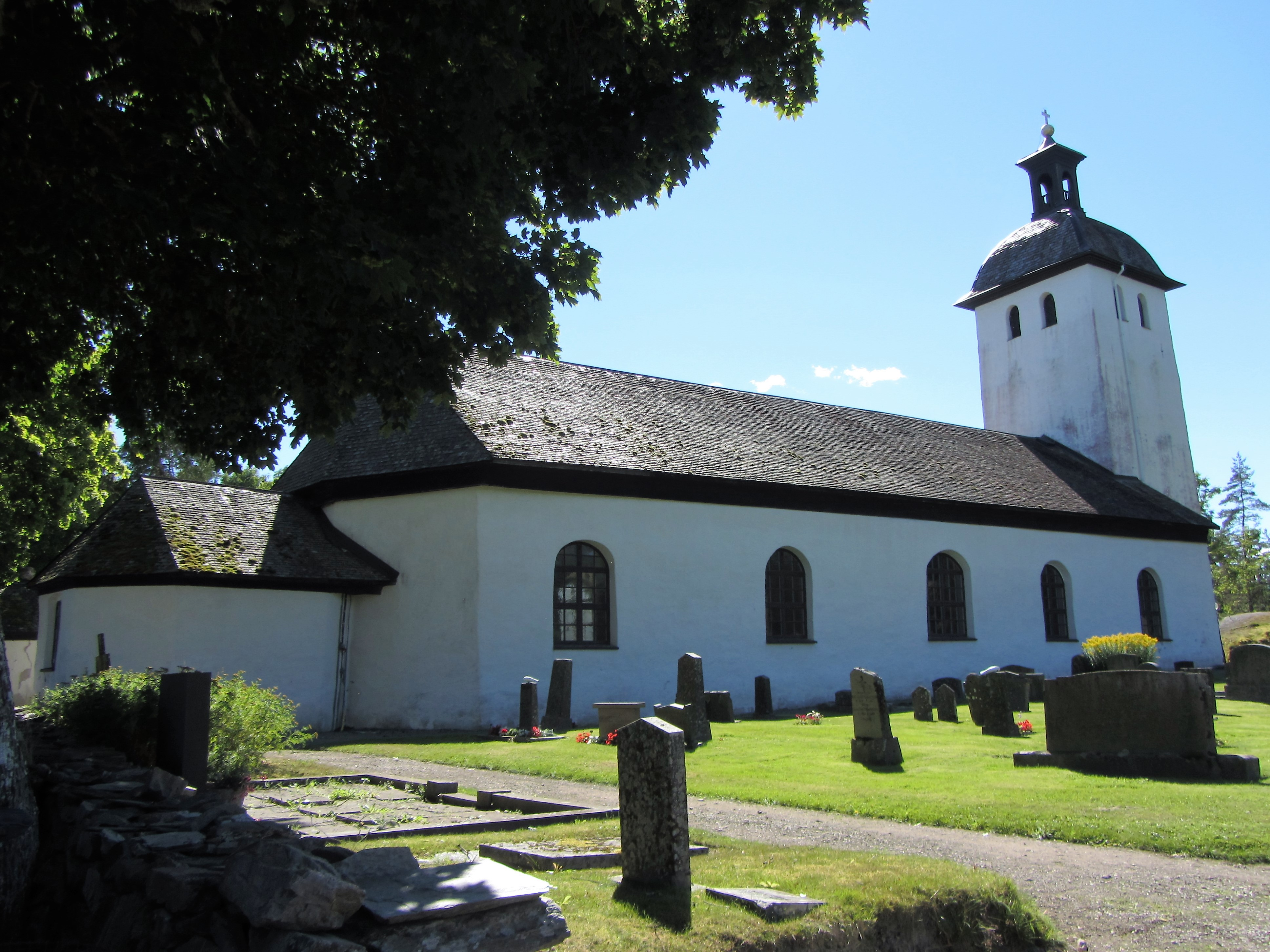 Steneby kyrka, söder om Bengtsfors i Dalsland.